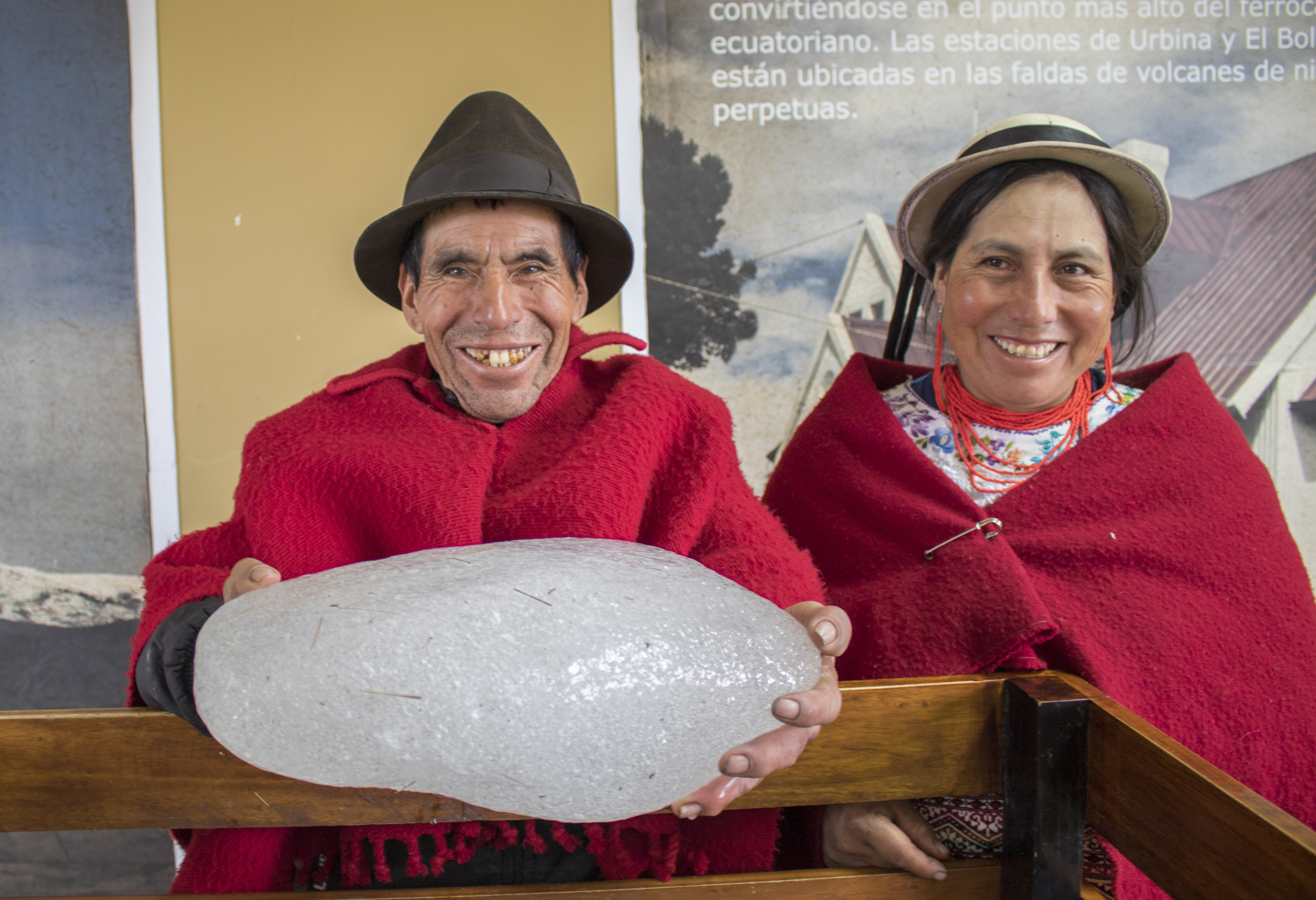 Baltazar Ushca sosteniendo un hielo extraído del Chimborazo, junto a su hija Carmita Ushca. La fotografía fue tomada el domingo 2 de septiembre de 2018 alrededor de las 9 de la mañana, en el museo del tren, un recorrido que se hace en la ruta del hielo 1 desde Riobamba. La cámara la tengo desconfigurada en su fecha y hora, por eso lo corrijo en la descripción.